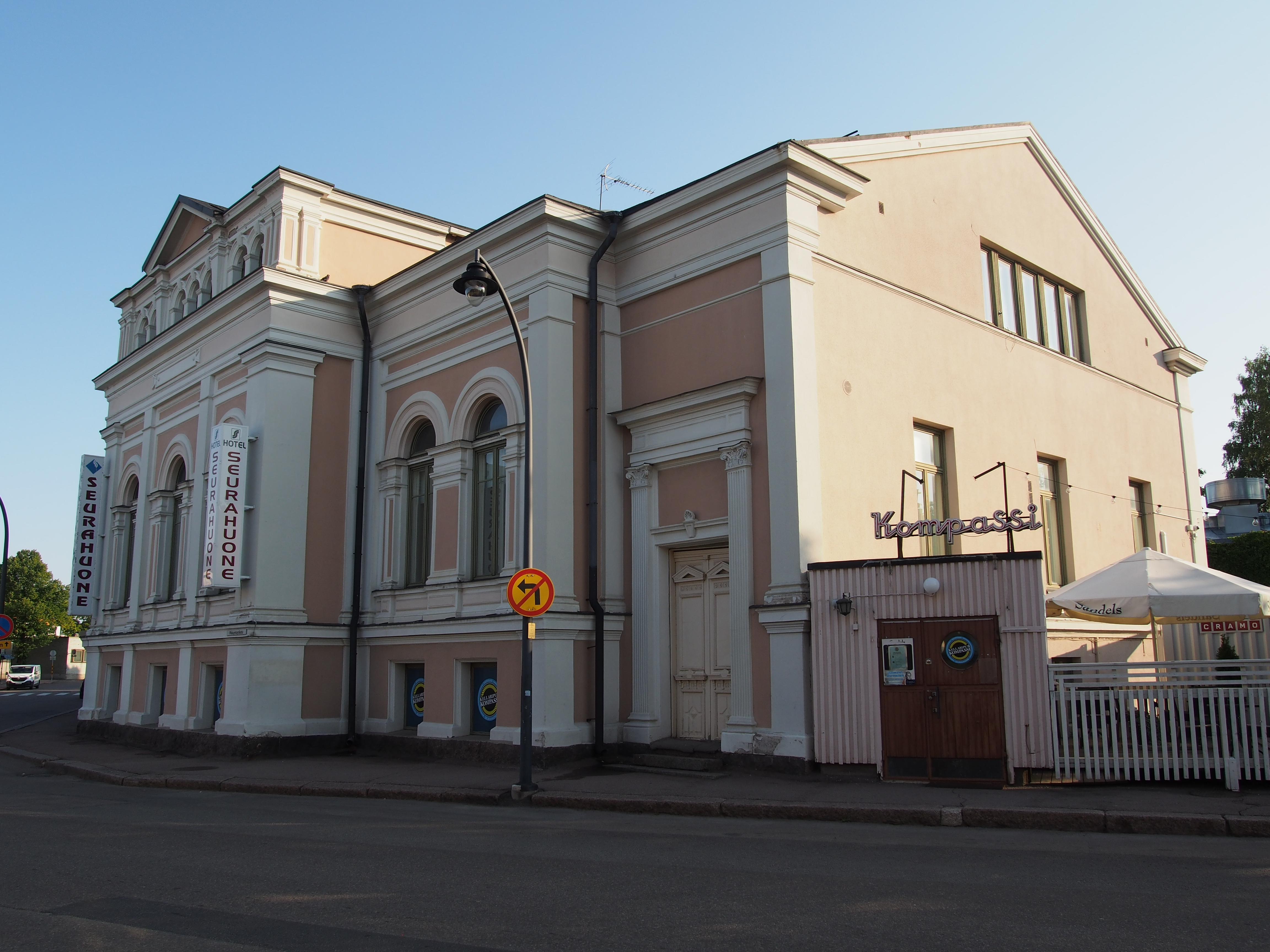 Haminan Seurahuone